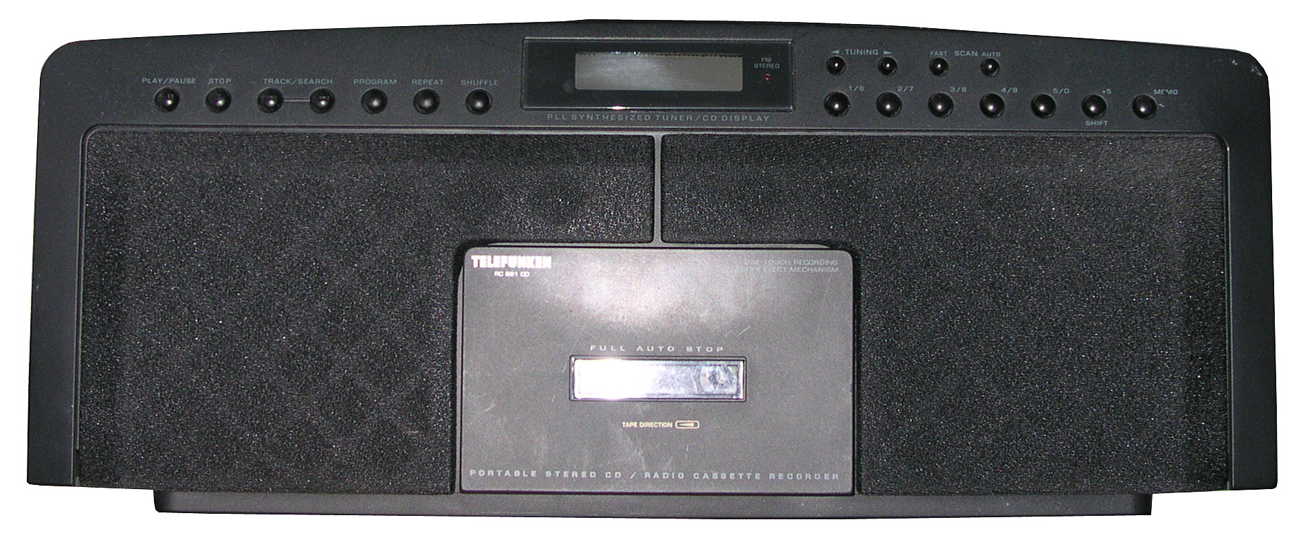 Telefunken RC 881 CD, Radiorecorder mit CD-Spieler und 10 Senderplätzen